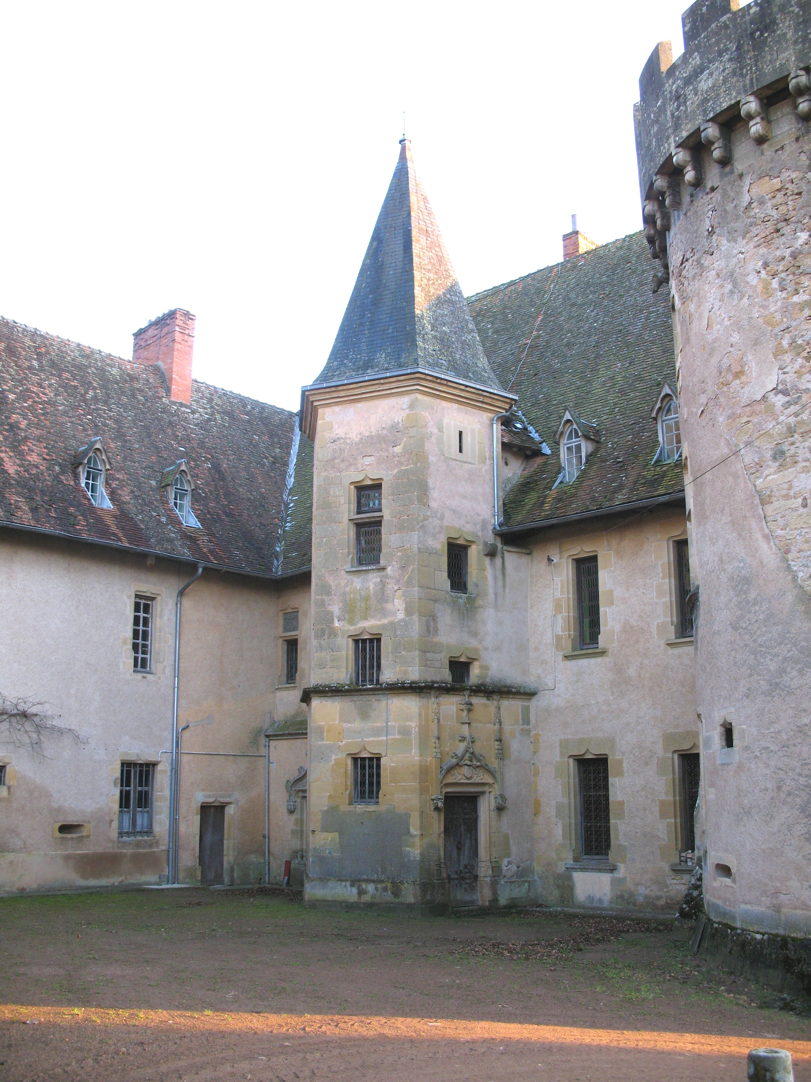 château de Châteauneuf (Saône-et-Loire)